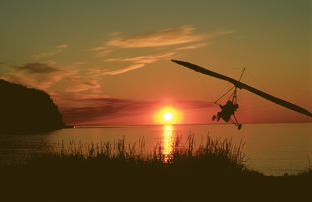 Coucher de soleil, Gaspésie / Sunset in Gaspésie (Québec, Canada)